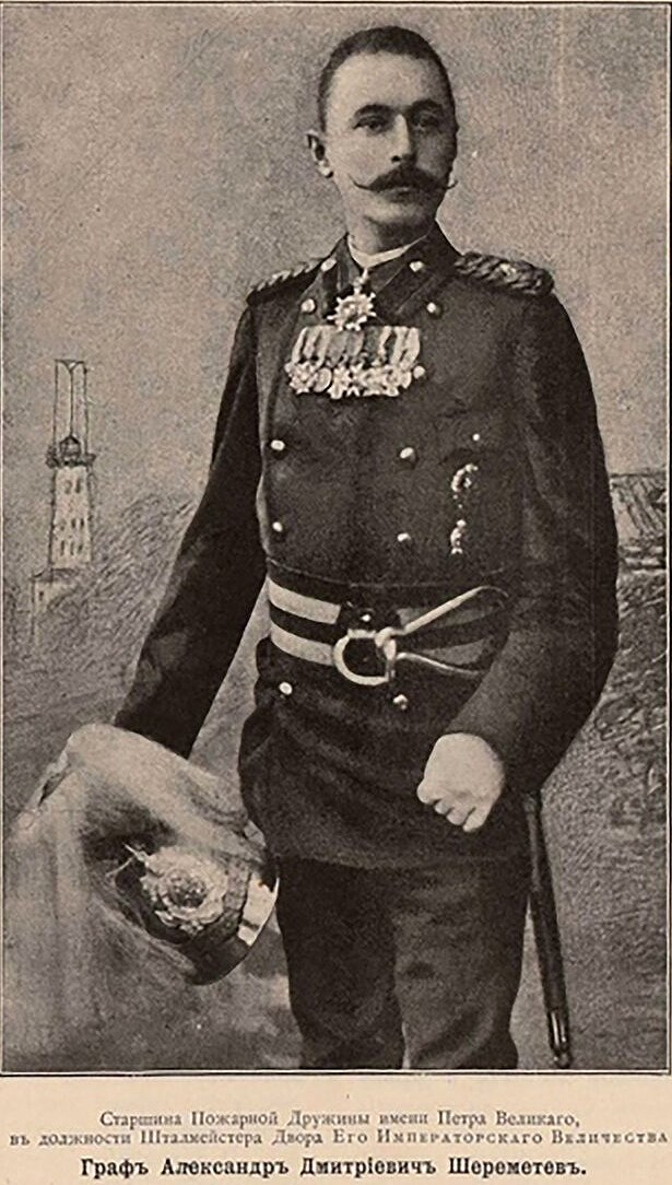 Шереметев, Александр Дмитриевич. Старшина и основатель Ульянковской пожарной дружины и дружины имени Петра Великого и Соединенного пожарного общества в форме пожарной дружины